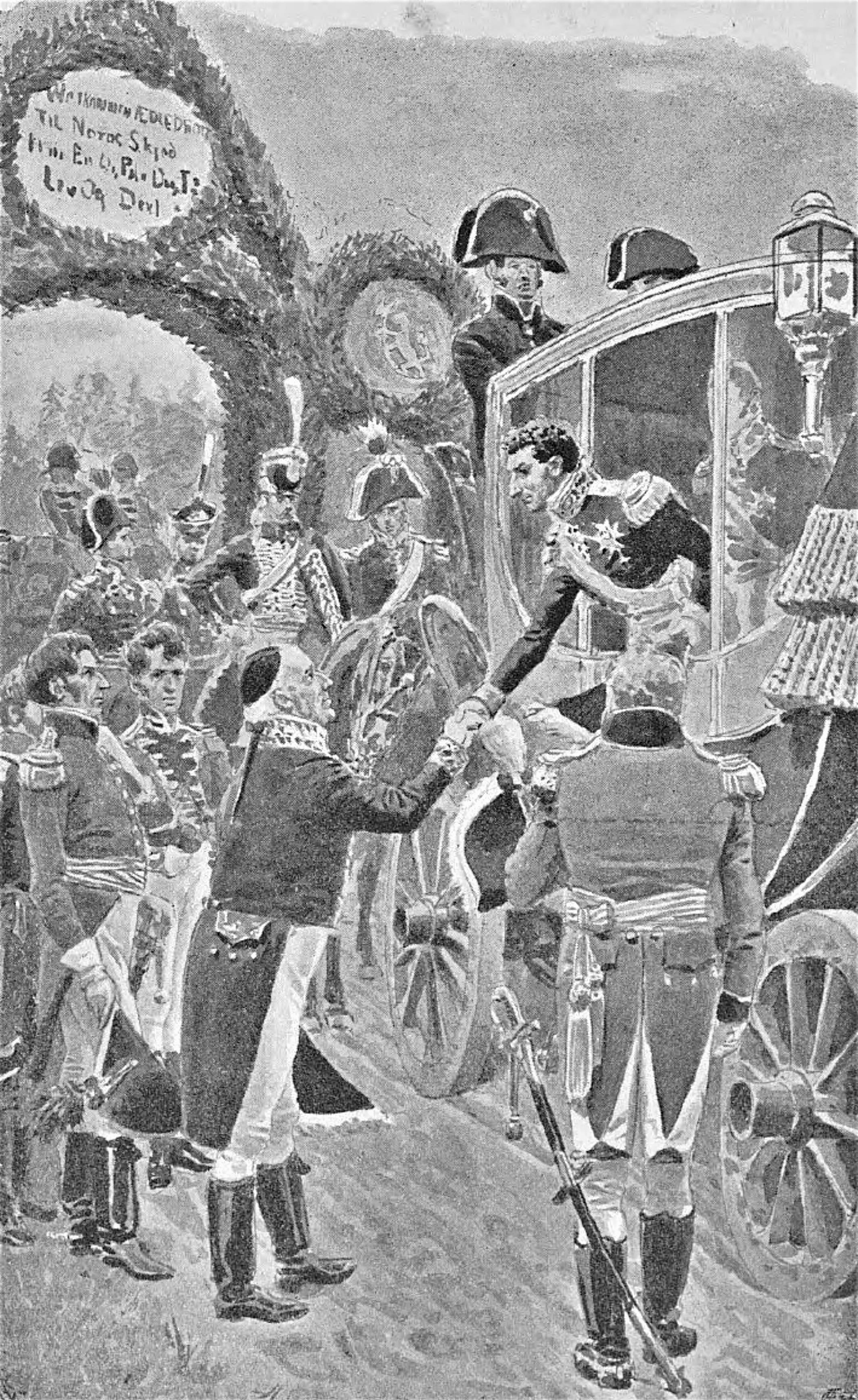 Visite du prince héritier Charles Jean de Suède en Norvège, 1815